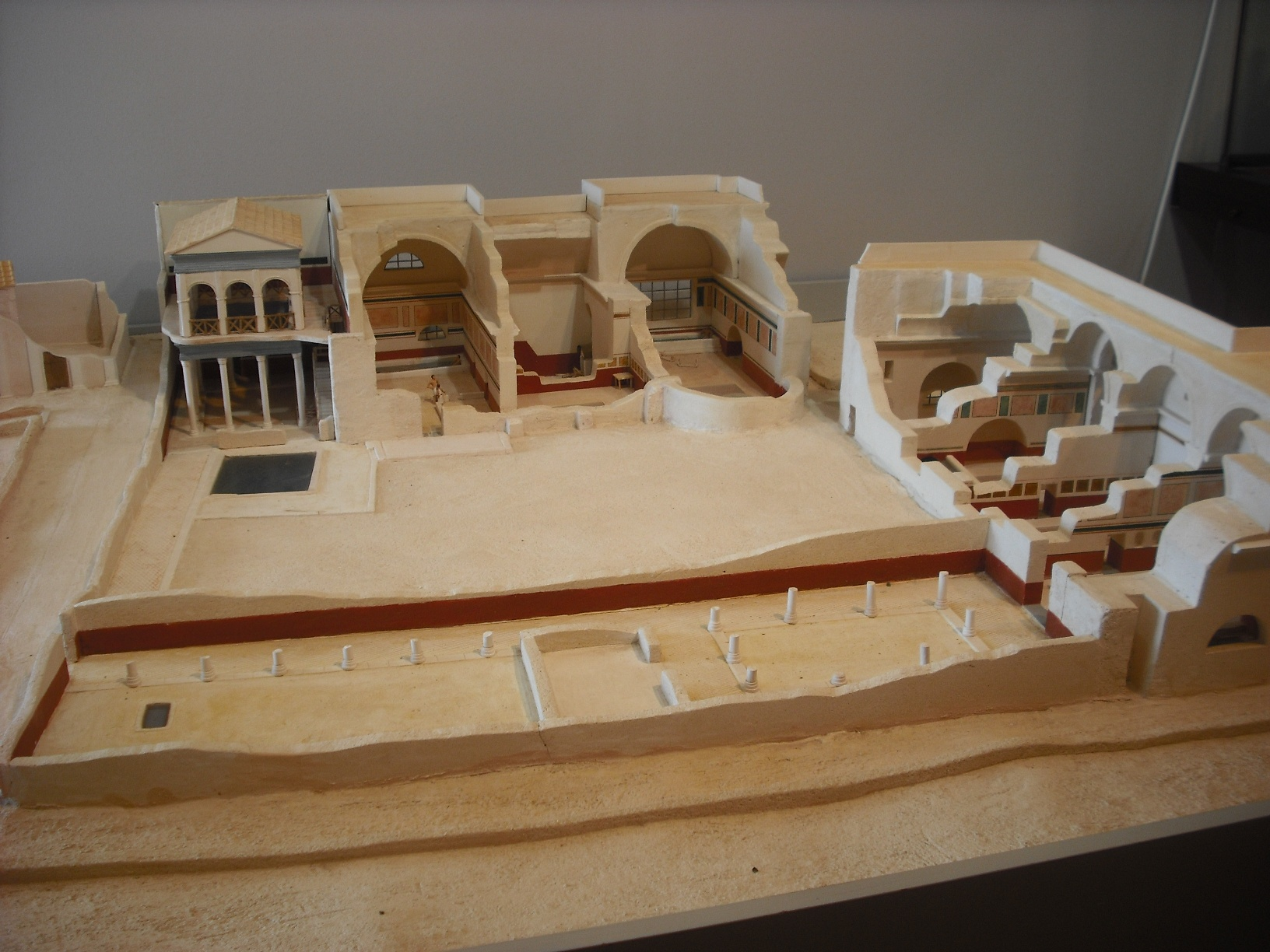 Vista general de la reconstrucció de les Termes de Mura, que es troba al MALL (Museu Arqueològic de Llíria).